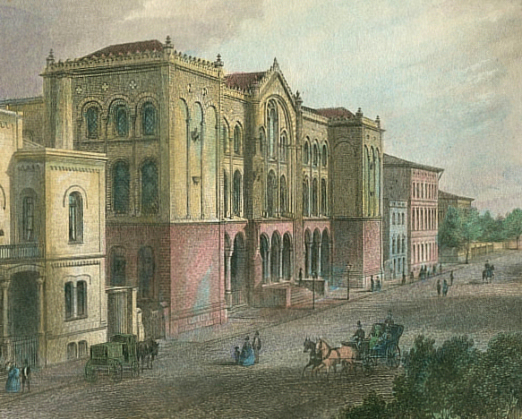 "Das Museum für Kunst und Wissenschaft in Hannover", heute das Künstlerhaus (unvollständig kolorierter) Stahlstich von Georg Michael Kurz, vor 1858. Die braunen Flecken oben und unten am Blatt sind Papierreste von der Hinterklebung hinter ein Passepartout.